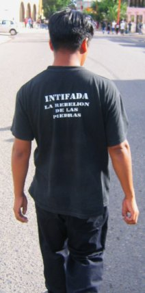 Caminando intifada-playera, Octubre 2004. Oaxaca Mexico